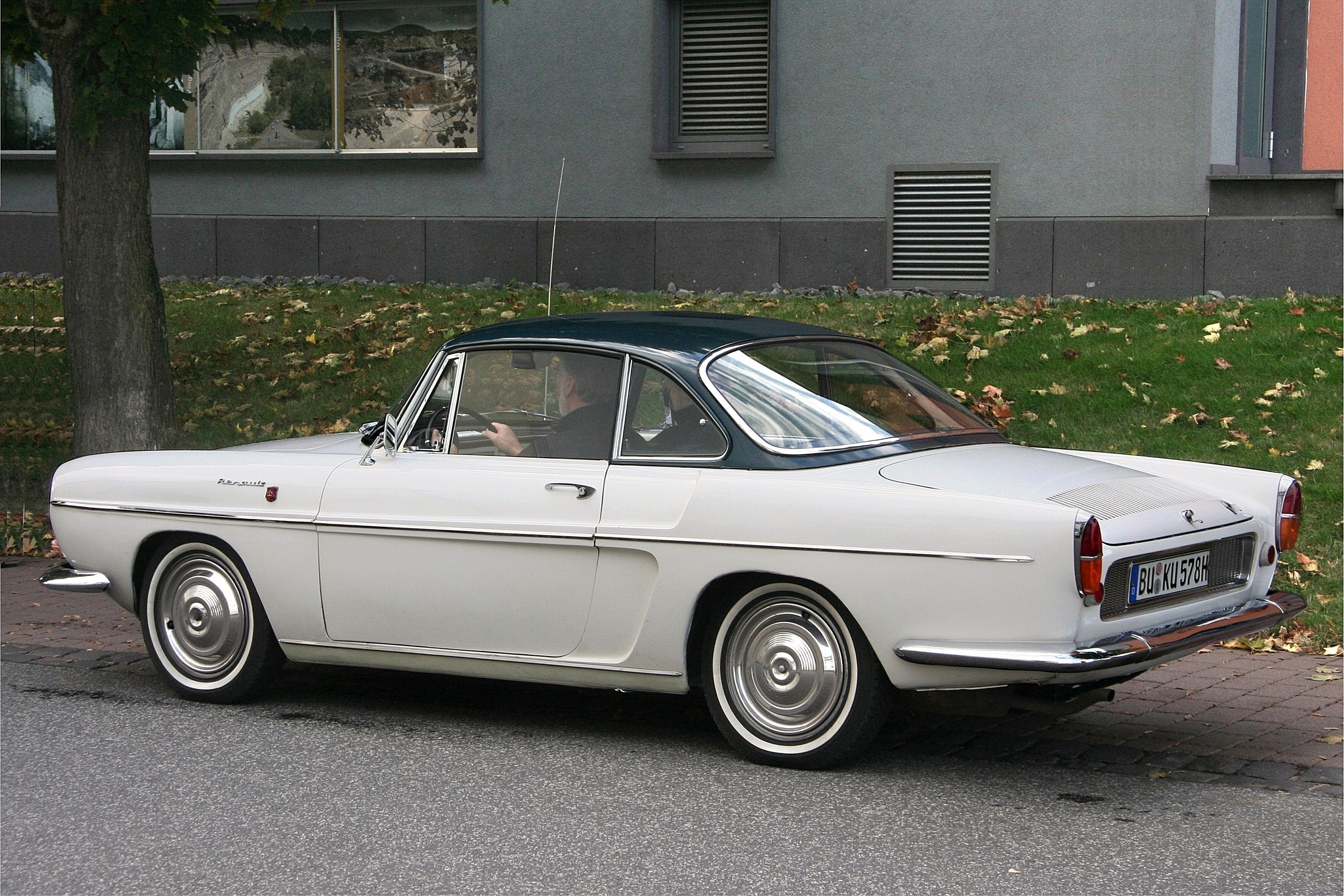 Renault Floride S mit Hardtop, Baujahr 1963 (Phantasiekennzeichen)